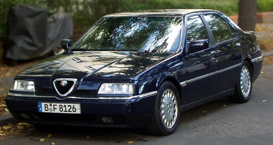 Alfa Romeo 164 Super 24V